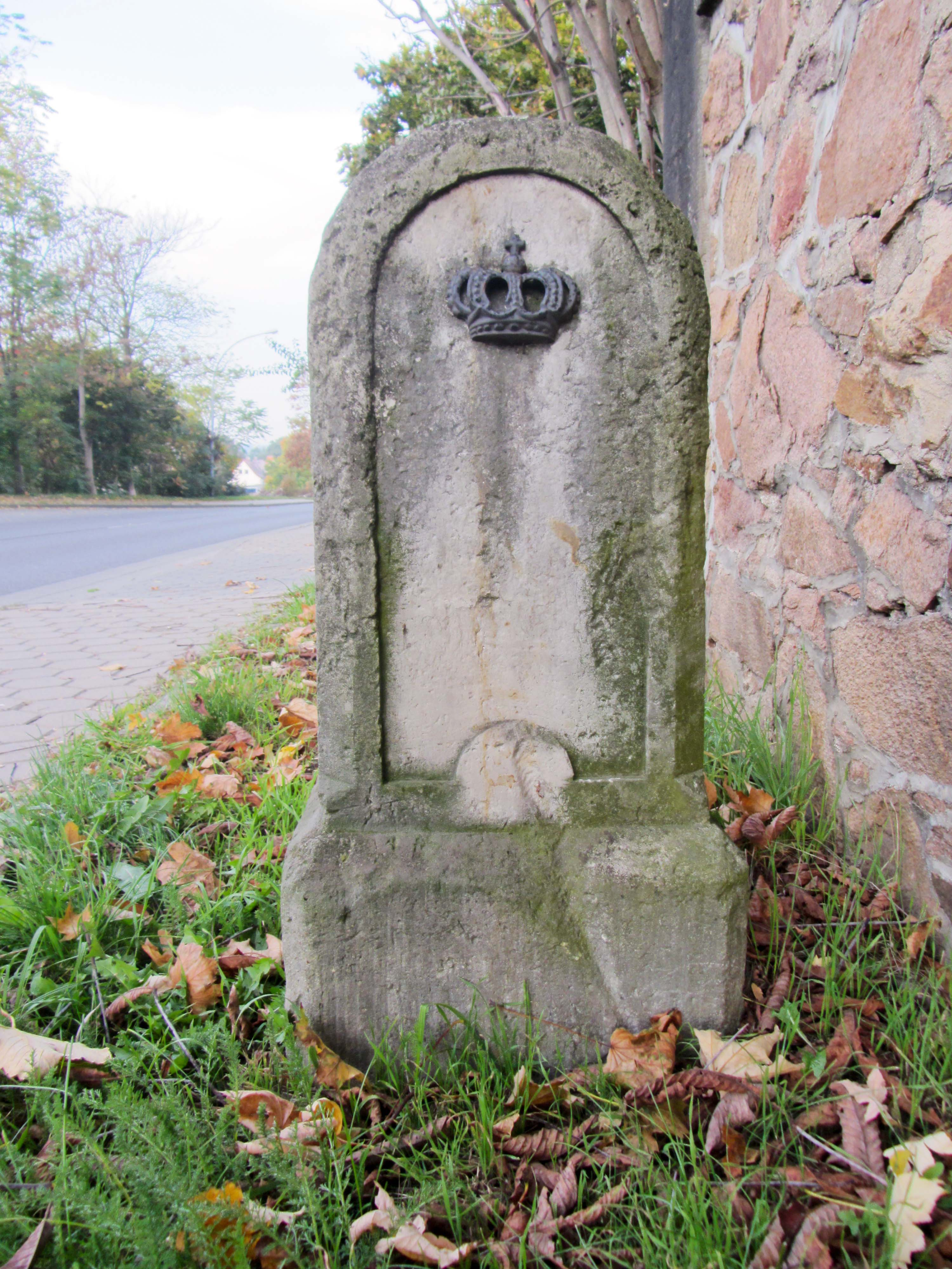 Königlich sächsischer Ganzmeilenstein an der B 175 in Döbeln